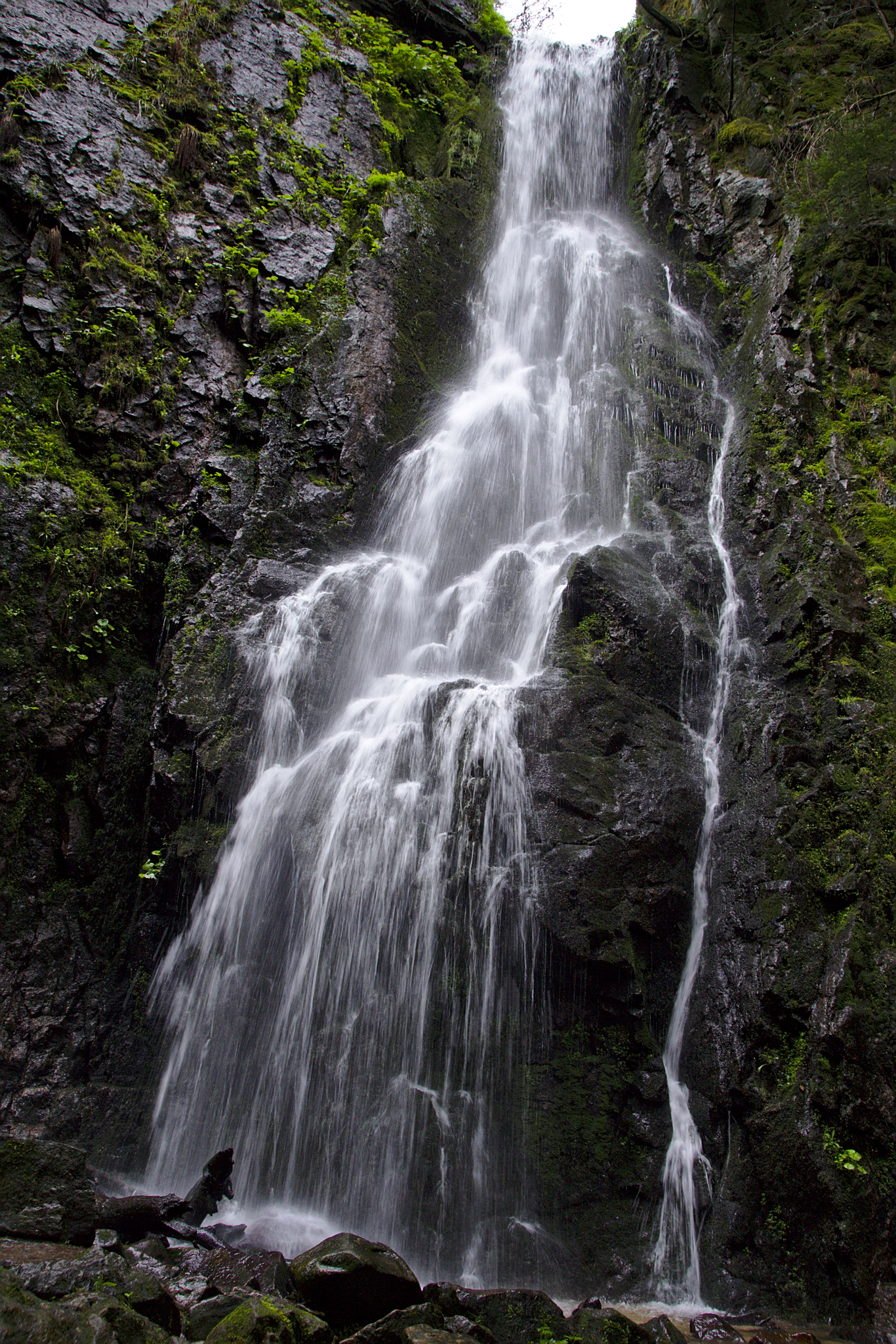 Der Burgbachwasserfall bei Schapbach im Schwarzwald nach starken Regenfällen.